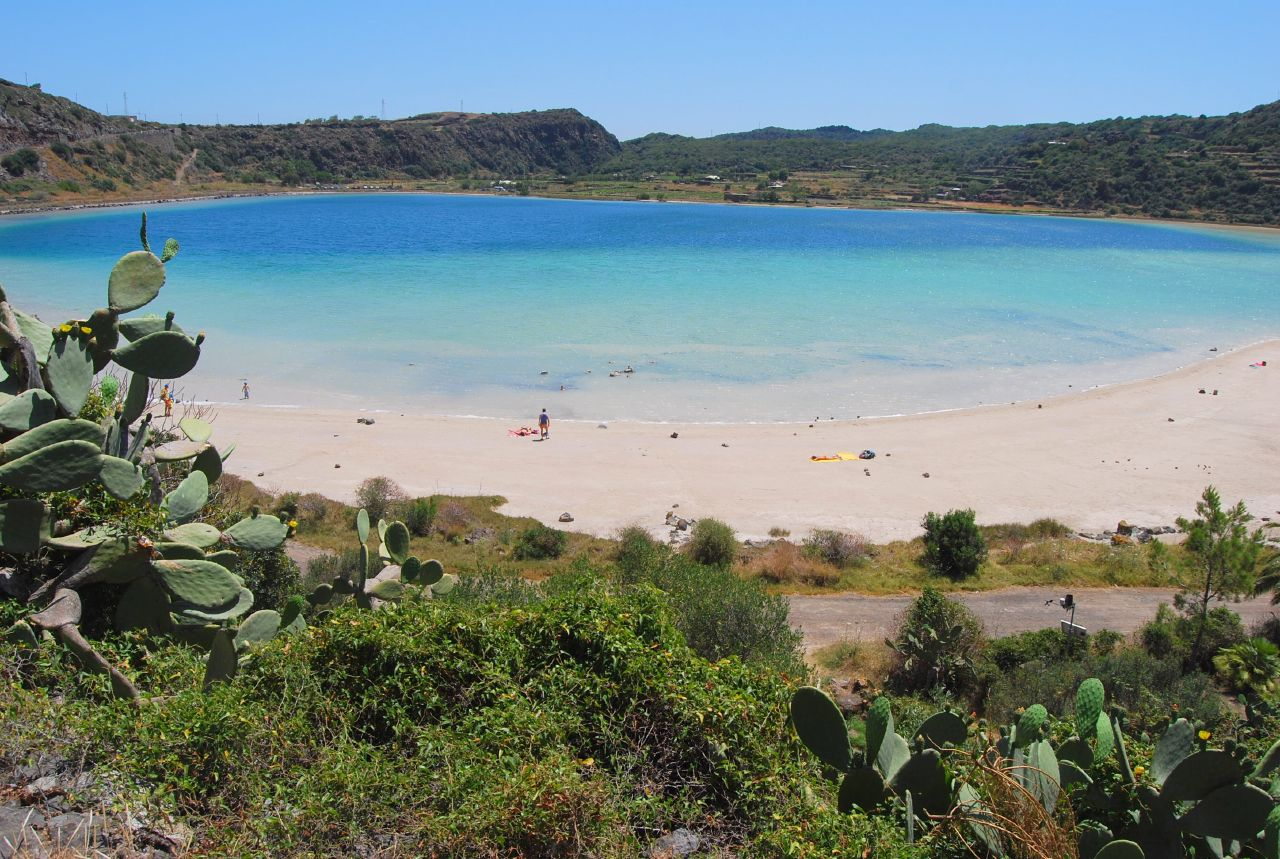 Pantelleria.....nulla di piu' bello